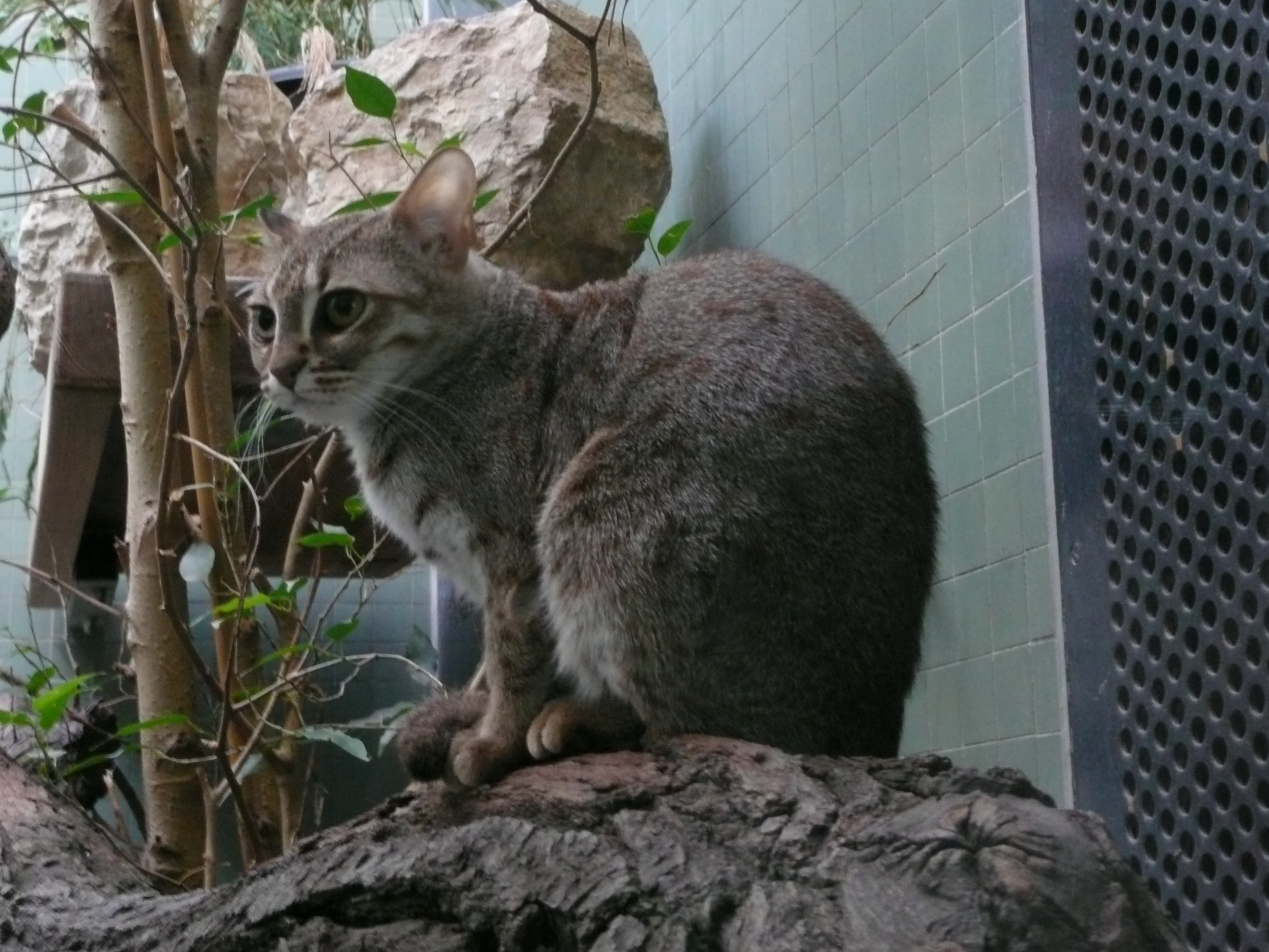 Rostkatze, Zoo Berlin